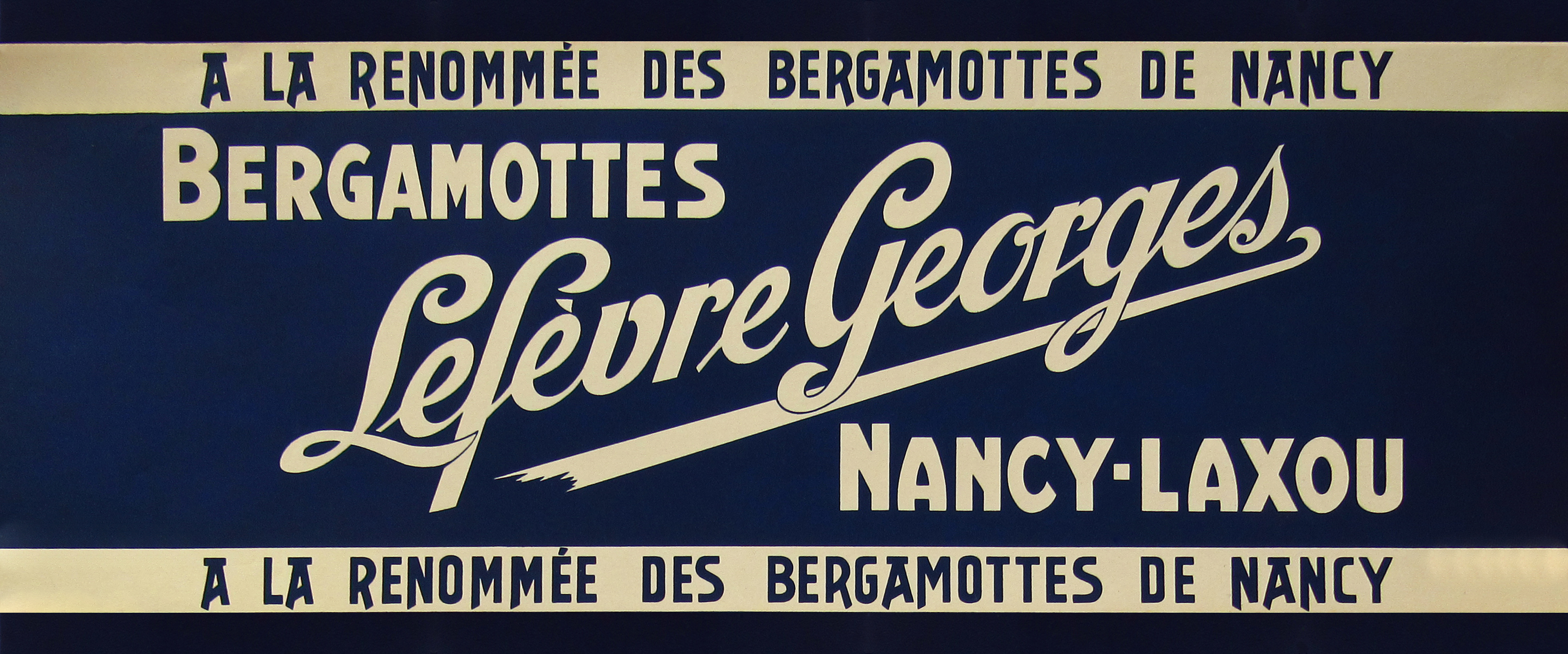 Bandeau en papier habillant des boites métalliques